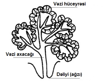 Xarici sekresiya vəziləri (lat. Glandulae excretoriae s. apertae) - axacaqlara malikdir, bunların məhsulu həmin axacaqlar vasitəsilə müəyyən üzvlərə tökülür, ya xaricə çıxarılır. Xarici sekresiya vəzisinin quruluş sxemi: vəzi hüceyrəsi, vəzi axacağı, dəliyi (ağzı)